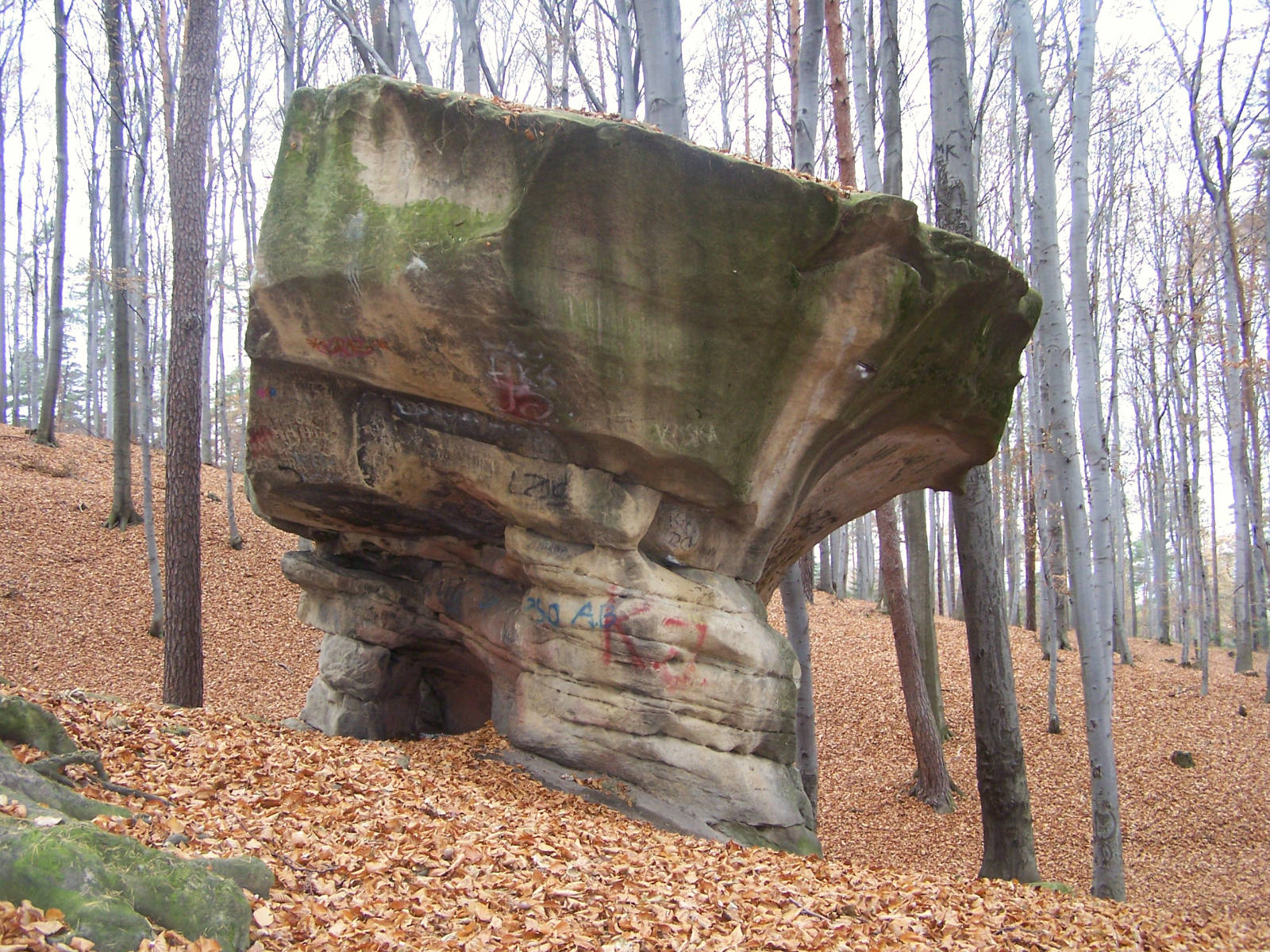 Reserve nature Kamień Grzyb (Pogórze Wiśnickie)